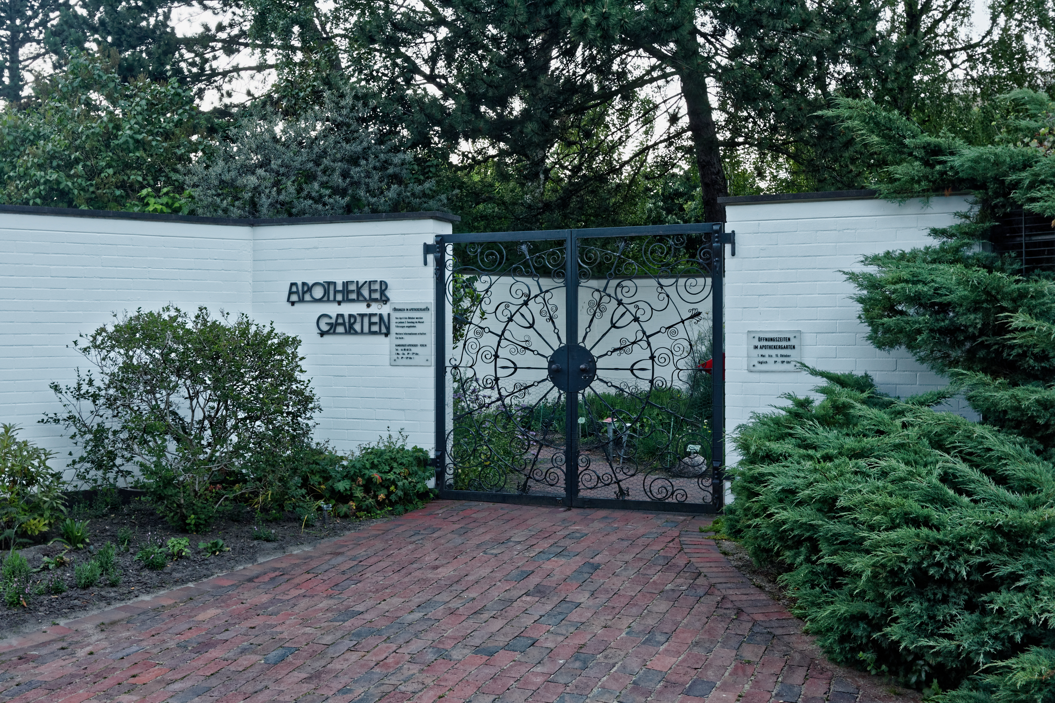 Hamburg, Planten un Blomen, Eingang zum ApothekergartenThis is a photograph of an architectural monument.